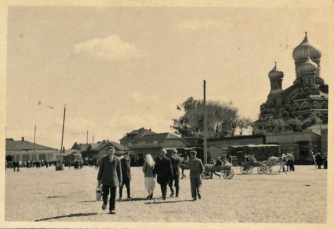 Беларуская (тарашкевіца): Барысаў (Barysaŭ), пляц Рынак (plac Rynak)